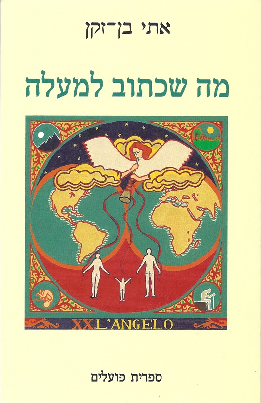 ספרה השני של בן-זקן ב"ספרית פועלים". ציור העטיפה: אתי בן-זקן